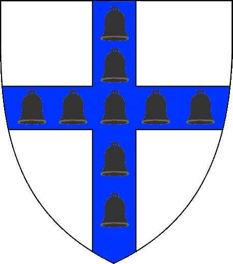 Blasón de la Familia Filangeri. cruz de azur sobre Campo de plata, con 9 campanas de raso.